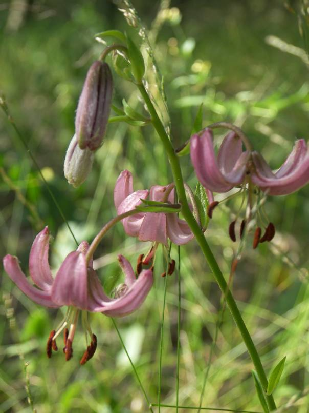 Přírodní park Baba